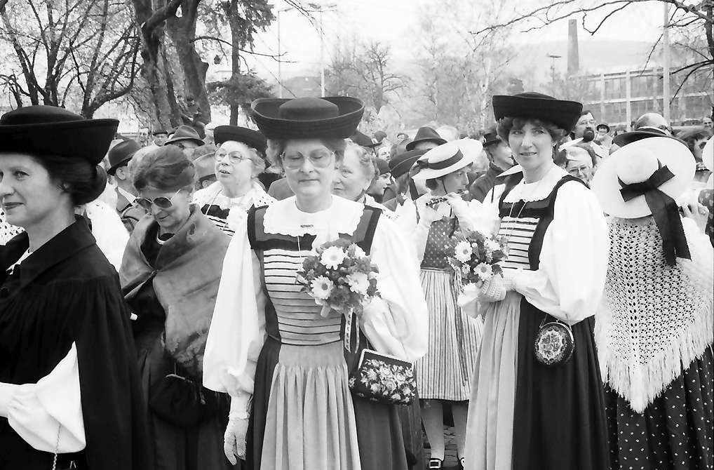 Lörrach: Landesgartenschau, Eröffnung; Trachenumzug